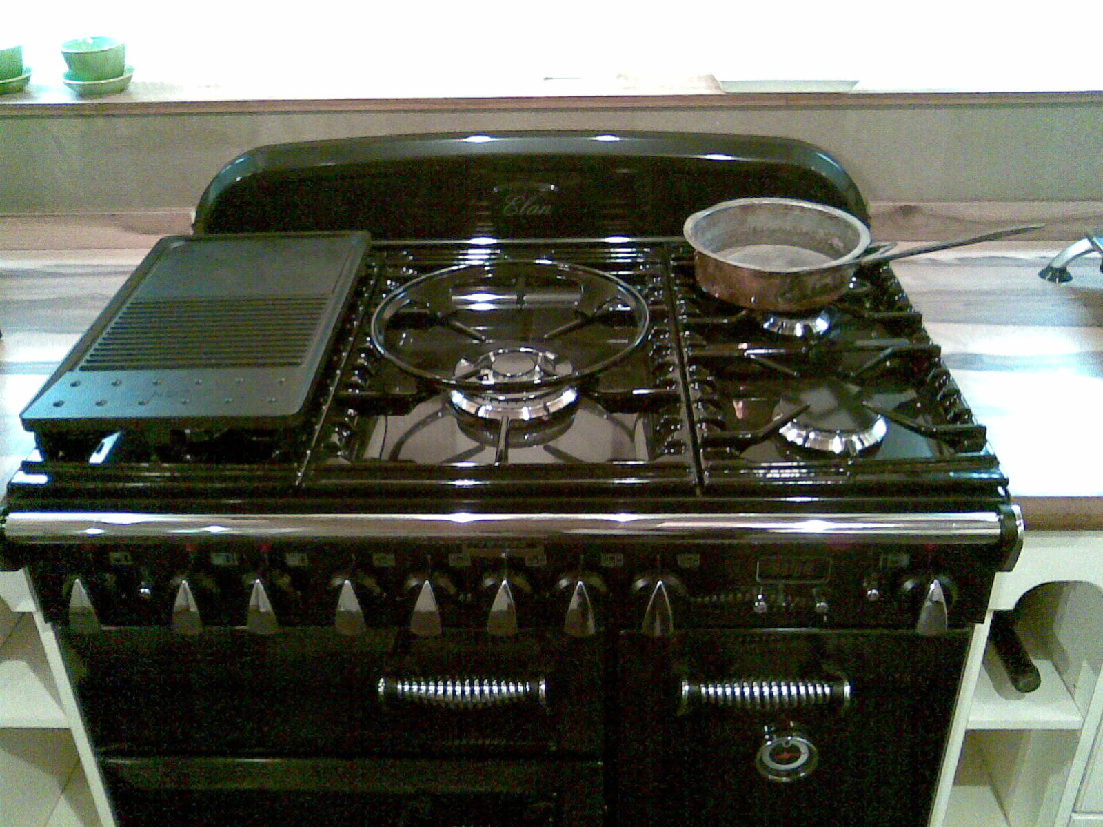 Kombinierter Gas-Elektroherd